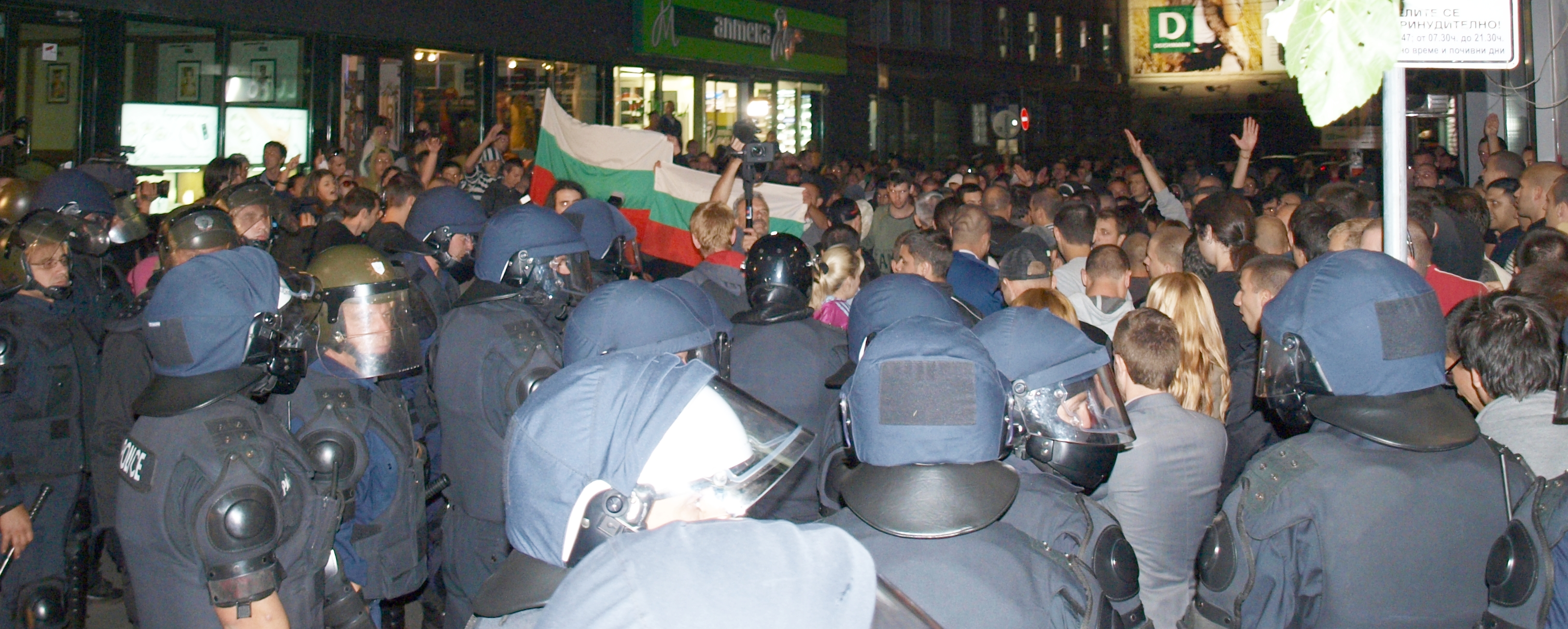 Простест срещу циганската престъпност в София